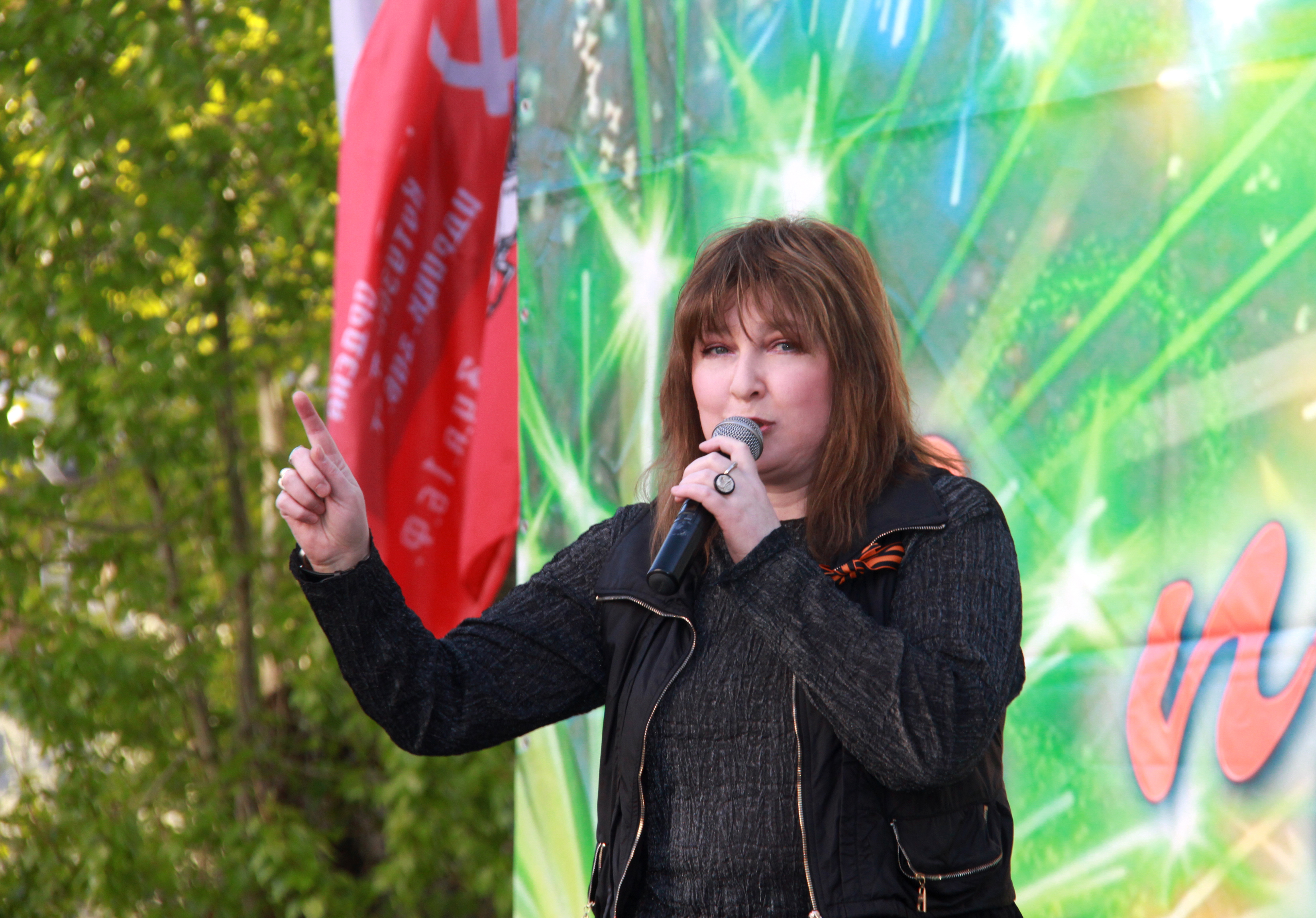 Певица и композитор Екатерина Семёнова